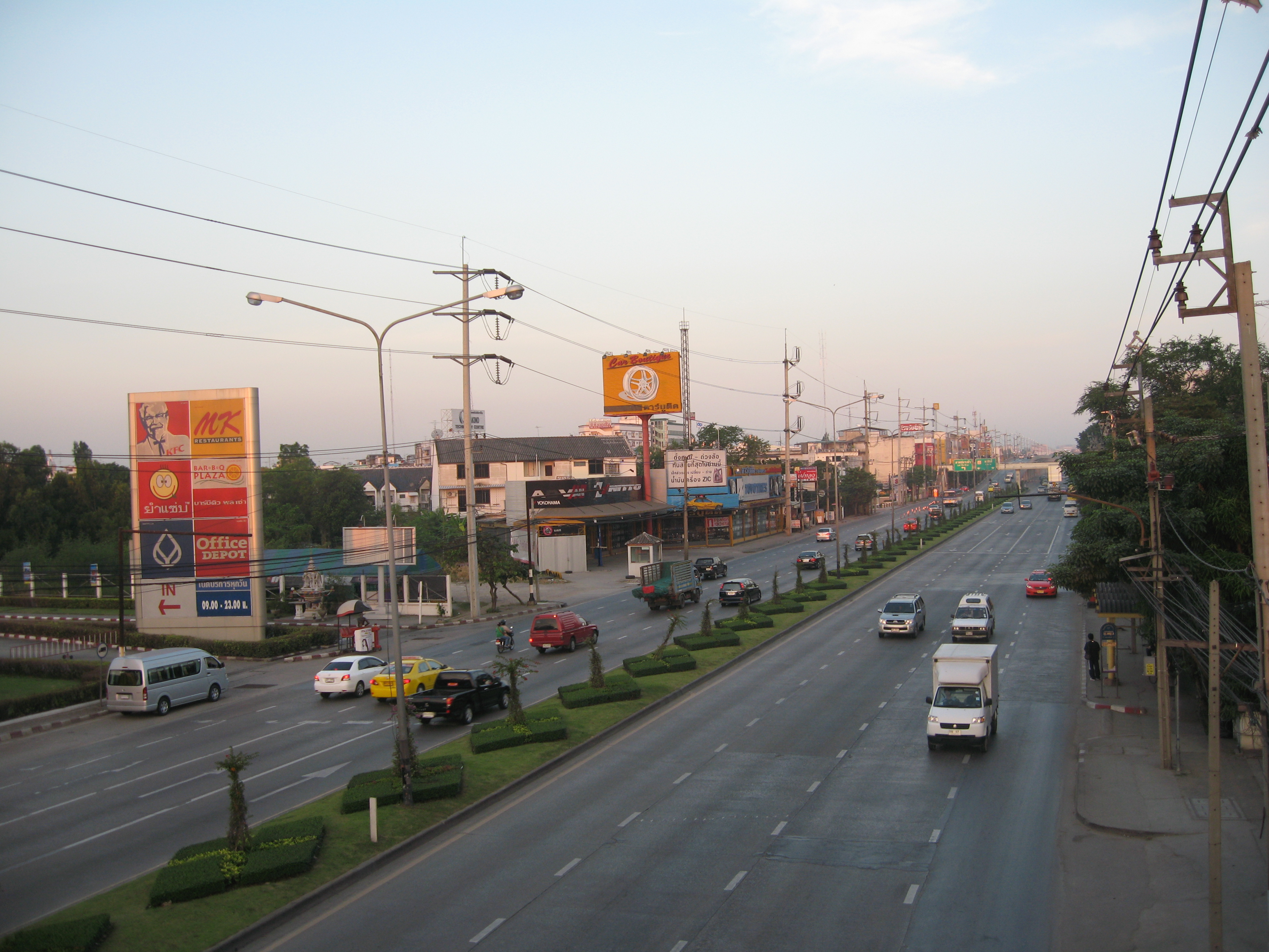 ถ. รามอินทรา